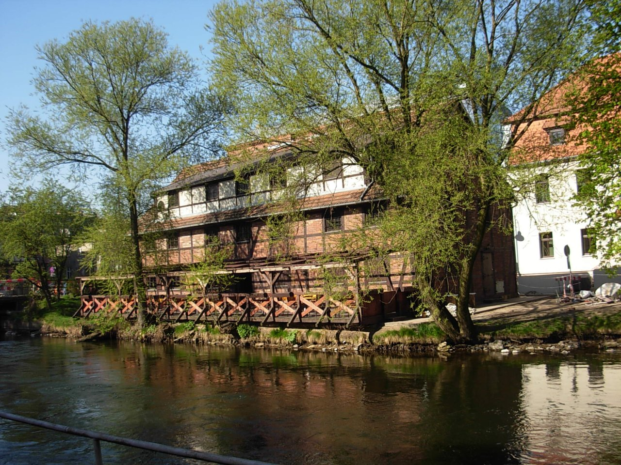 Karczma Młyńska na Wyspie Młyńskiej w Bydgoszczy